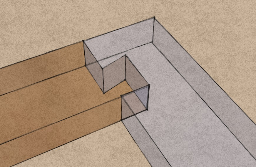 Sarokkötés fél fecskefarkú beeresztéssel